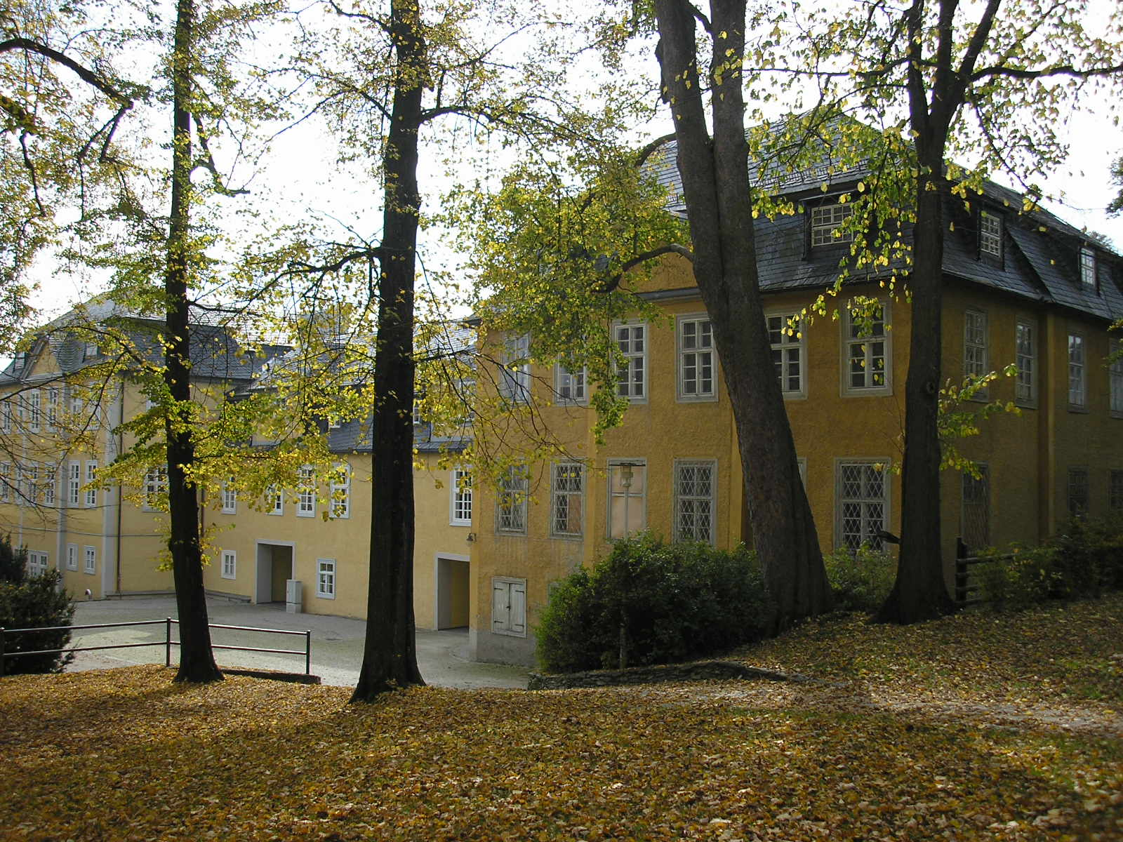 Die Gartenseite des Schlosses in Bad Lobenstein (Thüringen).